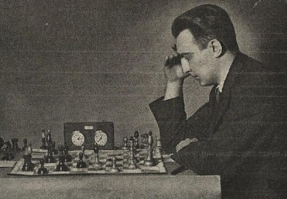 Jan Foltys (1908-1952), československý mezinárodní šachový mistr.